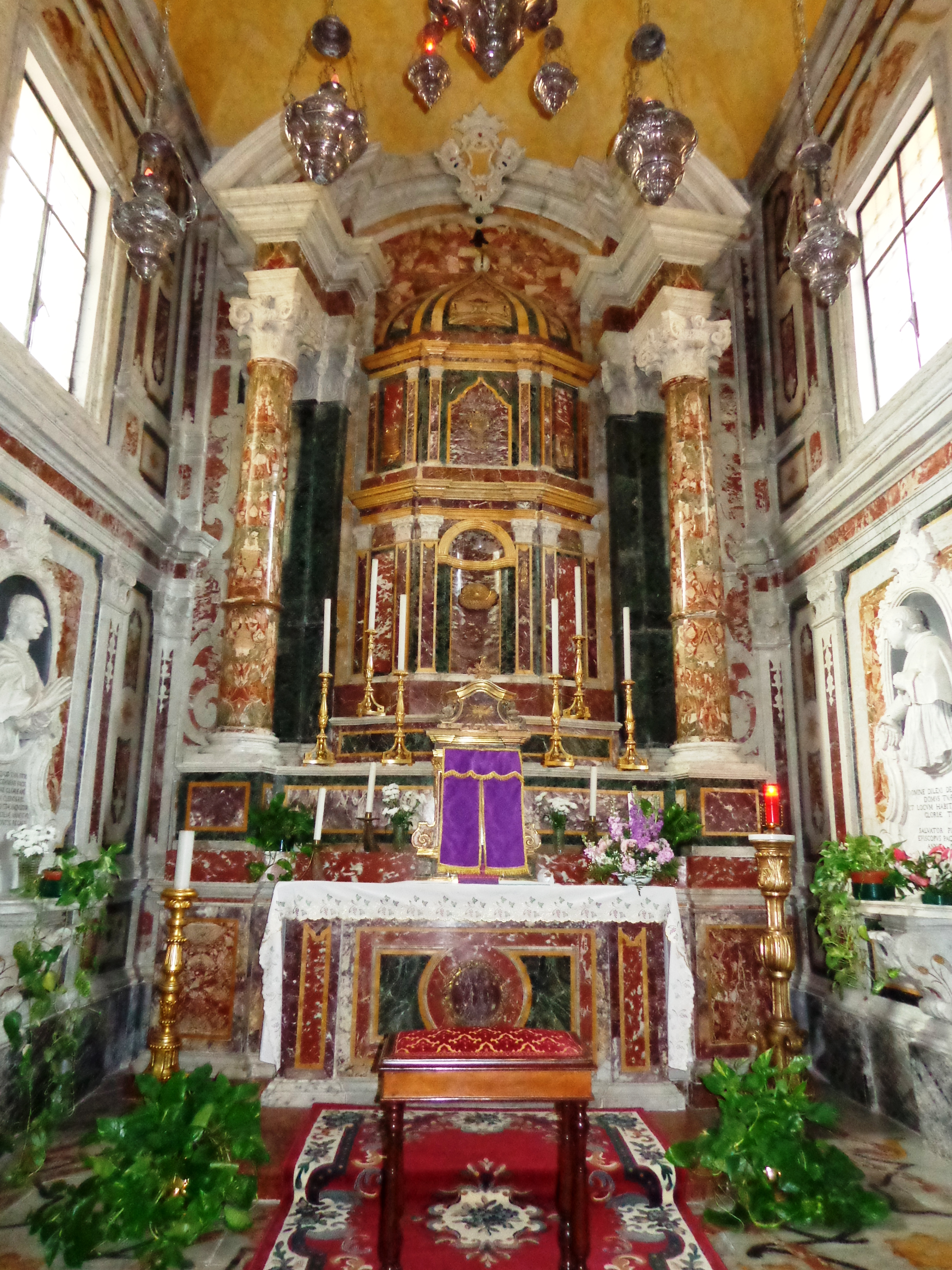 Cattedrale Patti 15